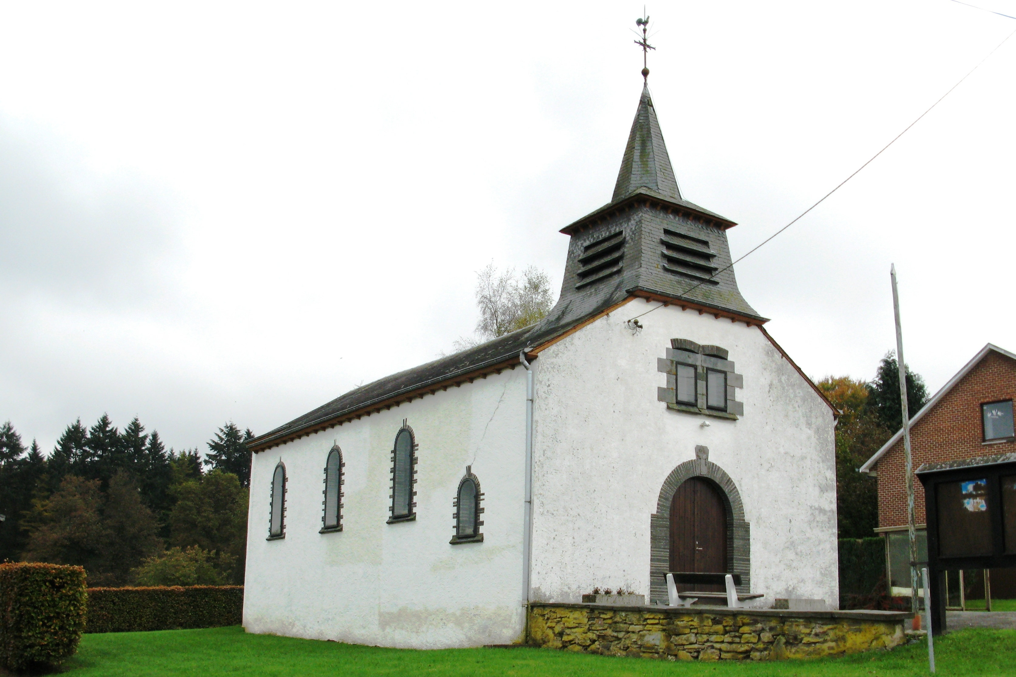 Chapelle a Lutrebois